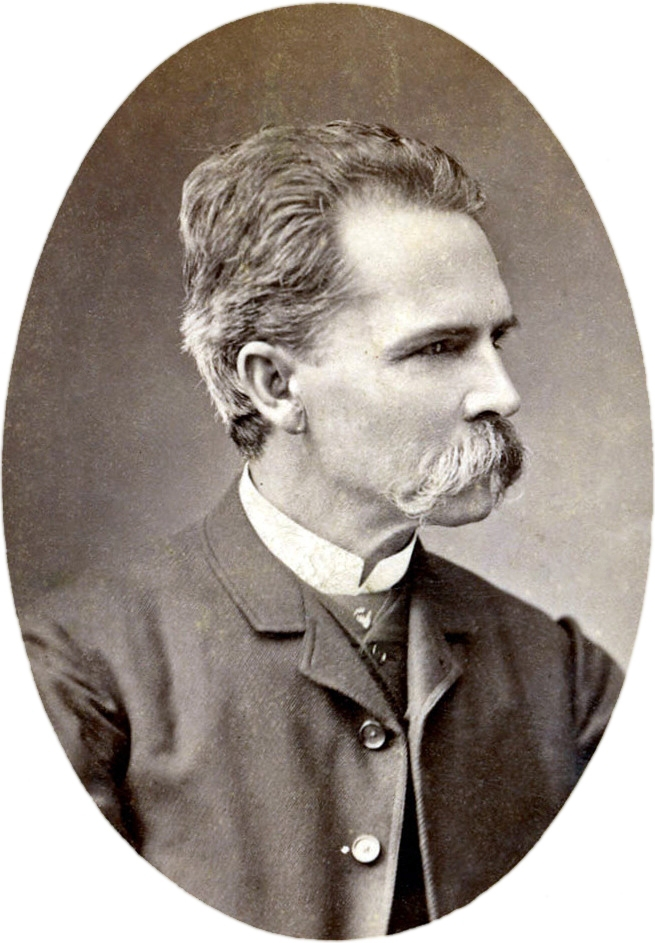 fi 322 Isaacs, Jorge